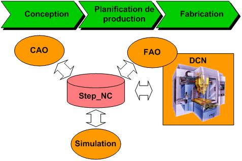 ChaineNumeriqueStep_NC